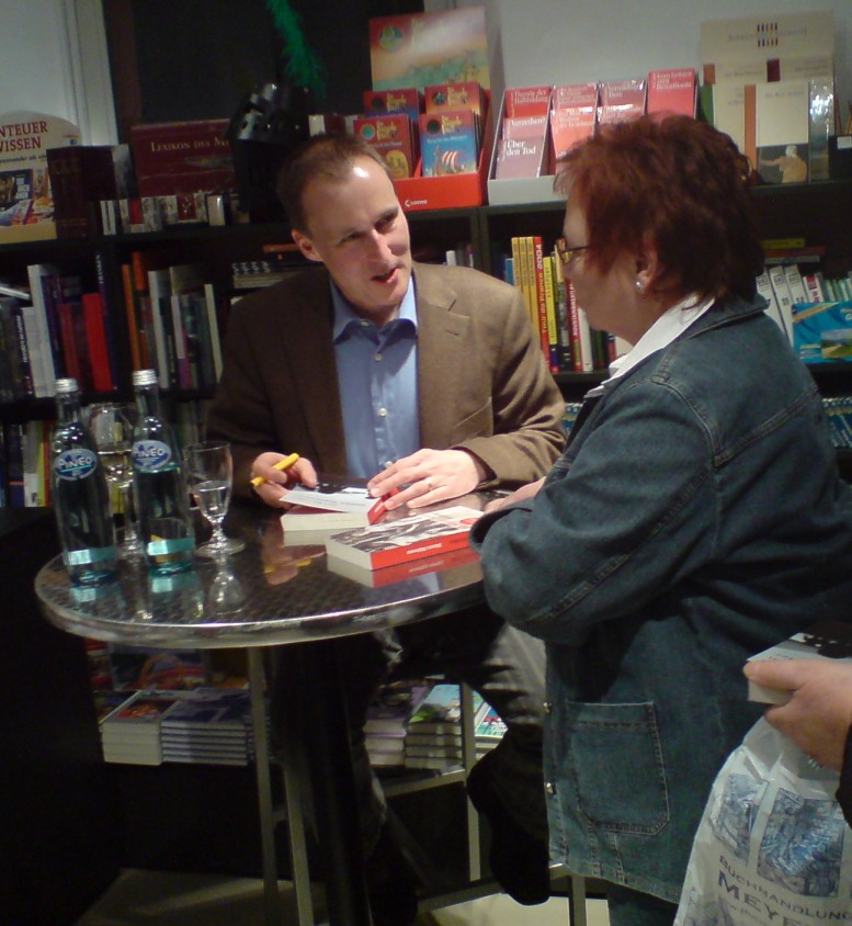 Autor Jan Beinßen bei einer Lesung in Weißenburg in Bayern